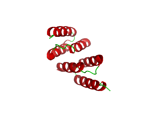 Protein Z